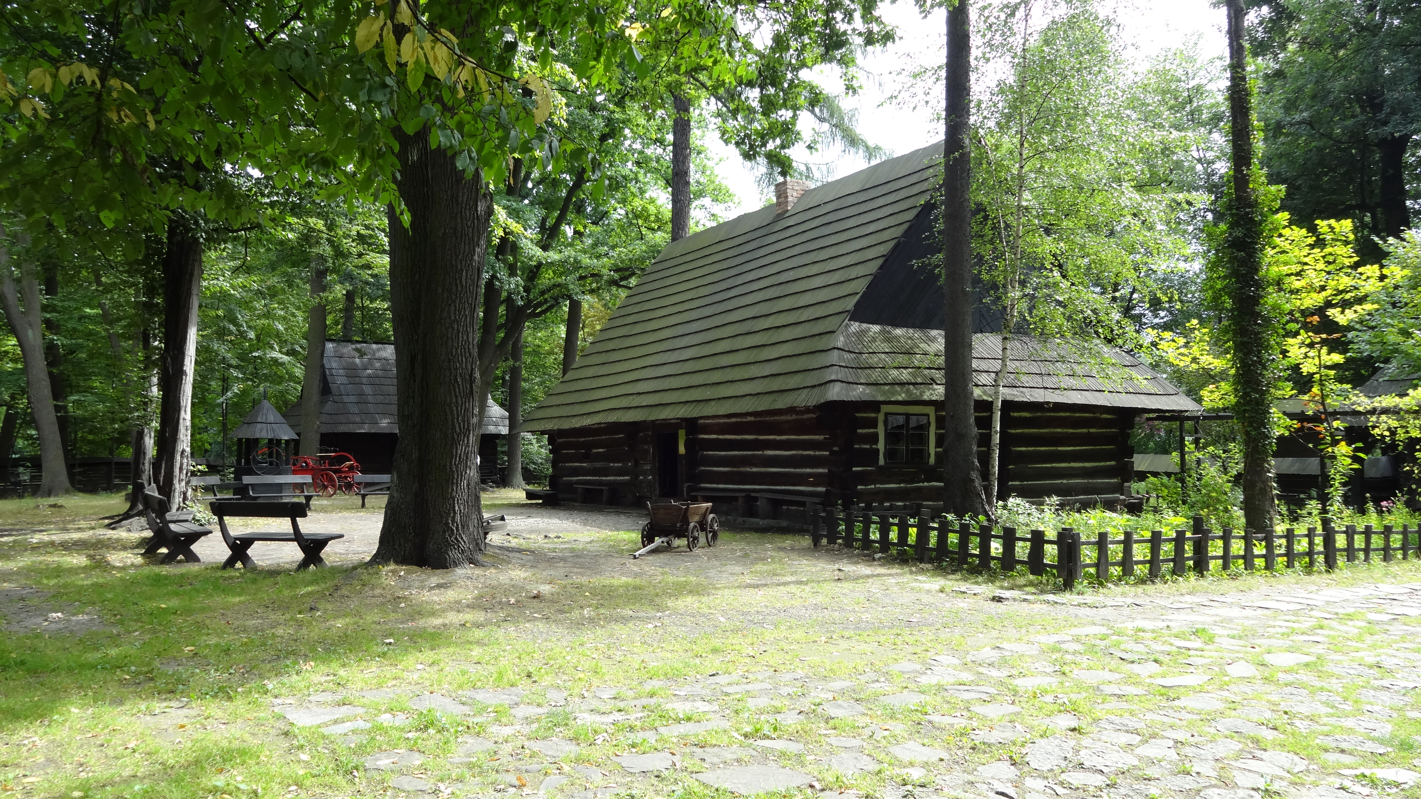 Pszczyna - zabytkowa chałupa w Zagrodzie Wsi Pszczyńskiej (zabytek nr A/1219/76)